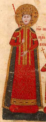 Царица Сара (Теодора), съпруга на цар Иван Александър, миниатюра от Лондонско евангелие